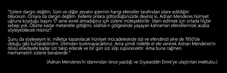 27 Mayıs 1960 darbesinde idam edilerek katledilen ilk ve tek Türkiye Başbakanı Adnan Menderes'in idamın önce yazdığı Gıyaseddin Emre'ye ulaştırılan mektubu.